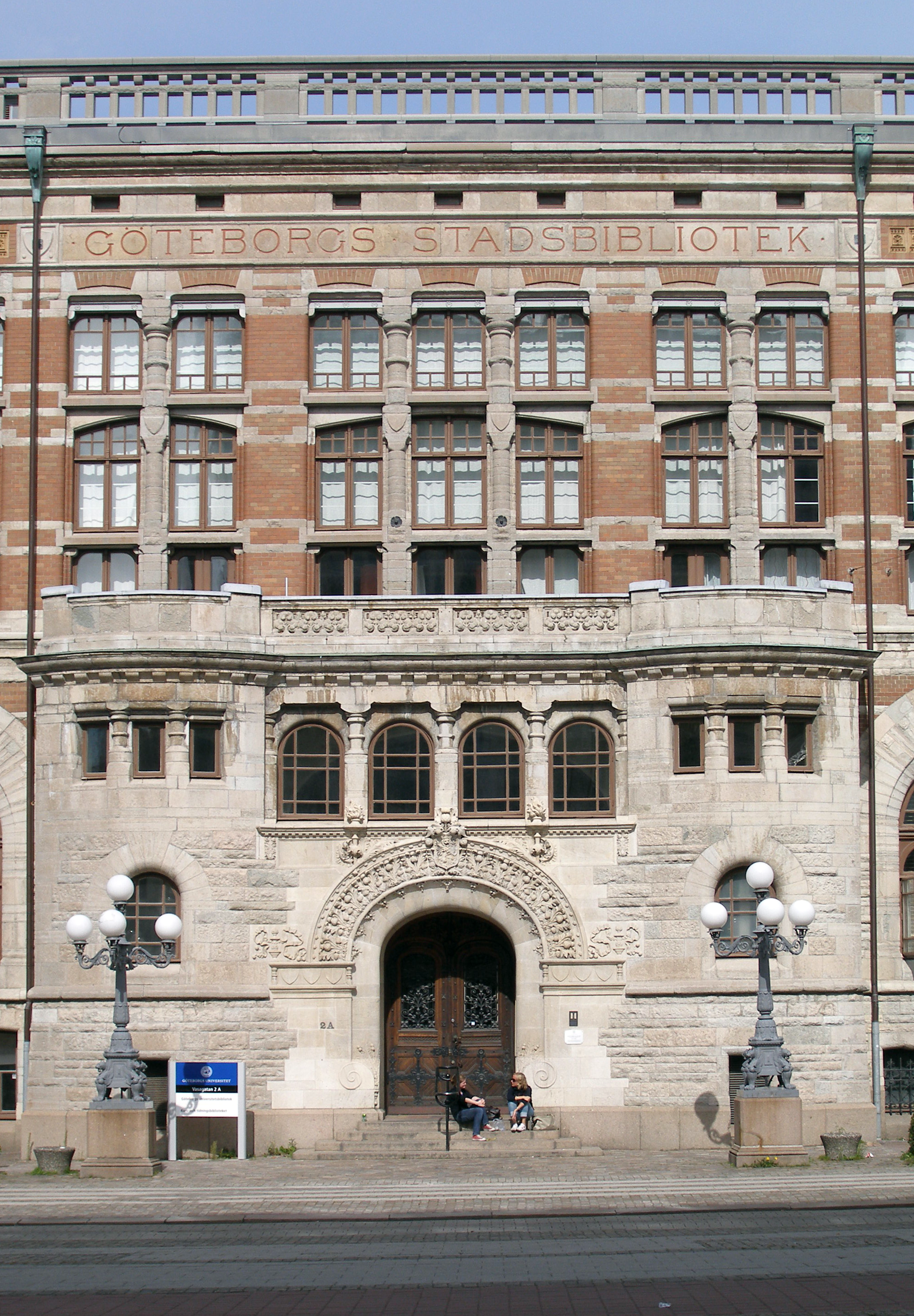 Entré och mittparti på fasaden till Samhällsvetenskapliga biblioteket, Göteborgs universitetsbibliotek.